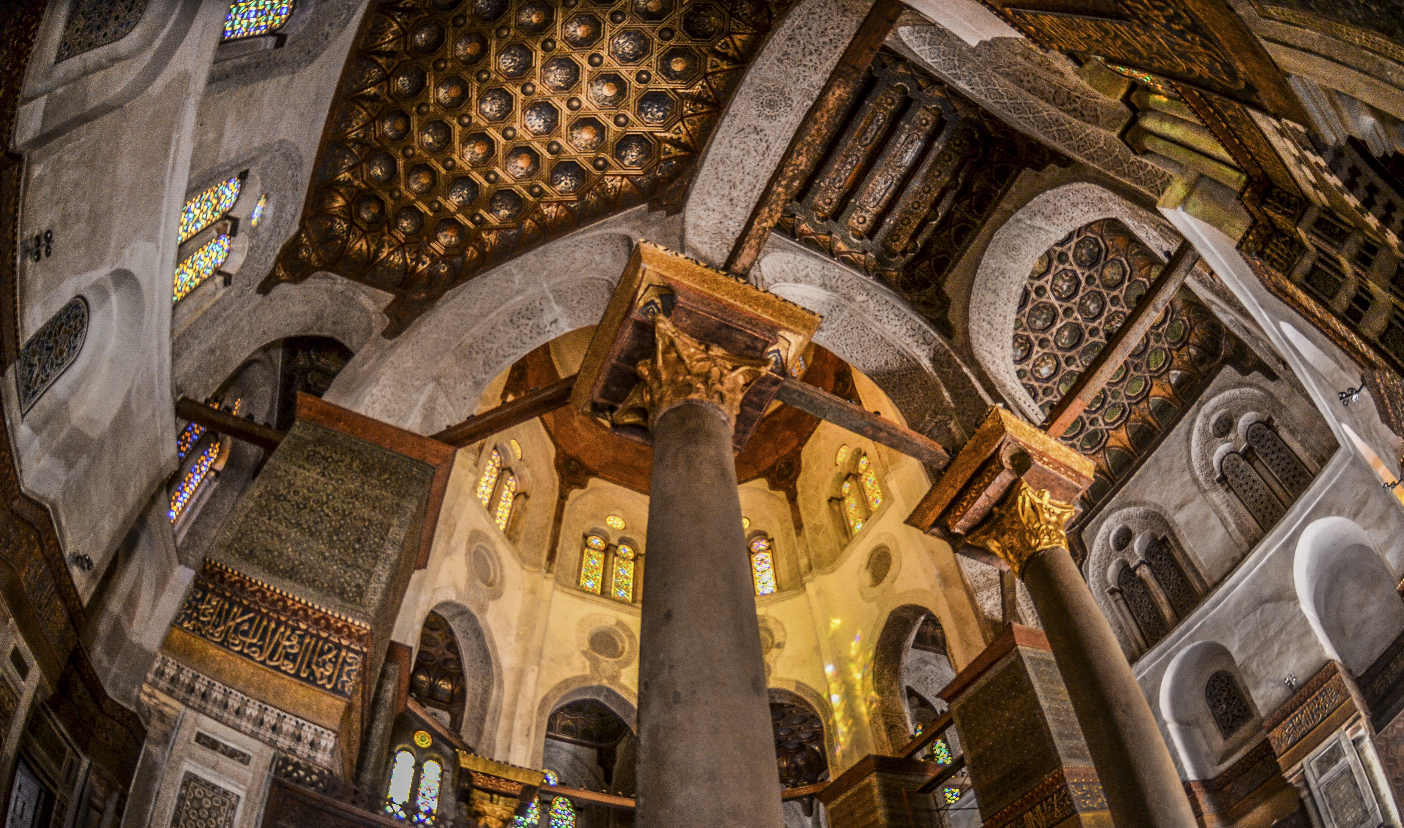 مجمع السلطان قلاون2